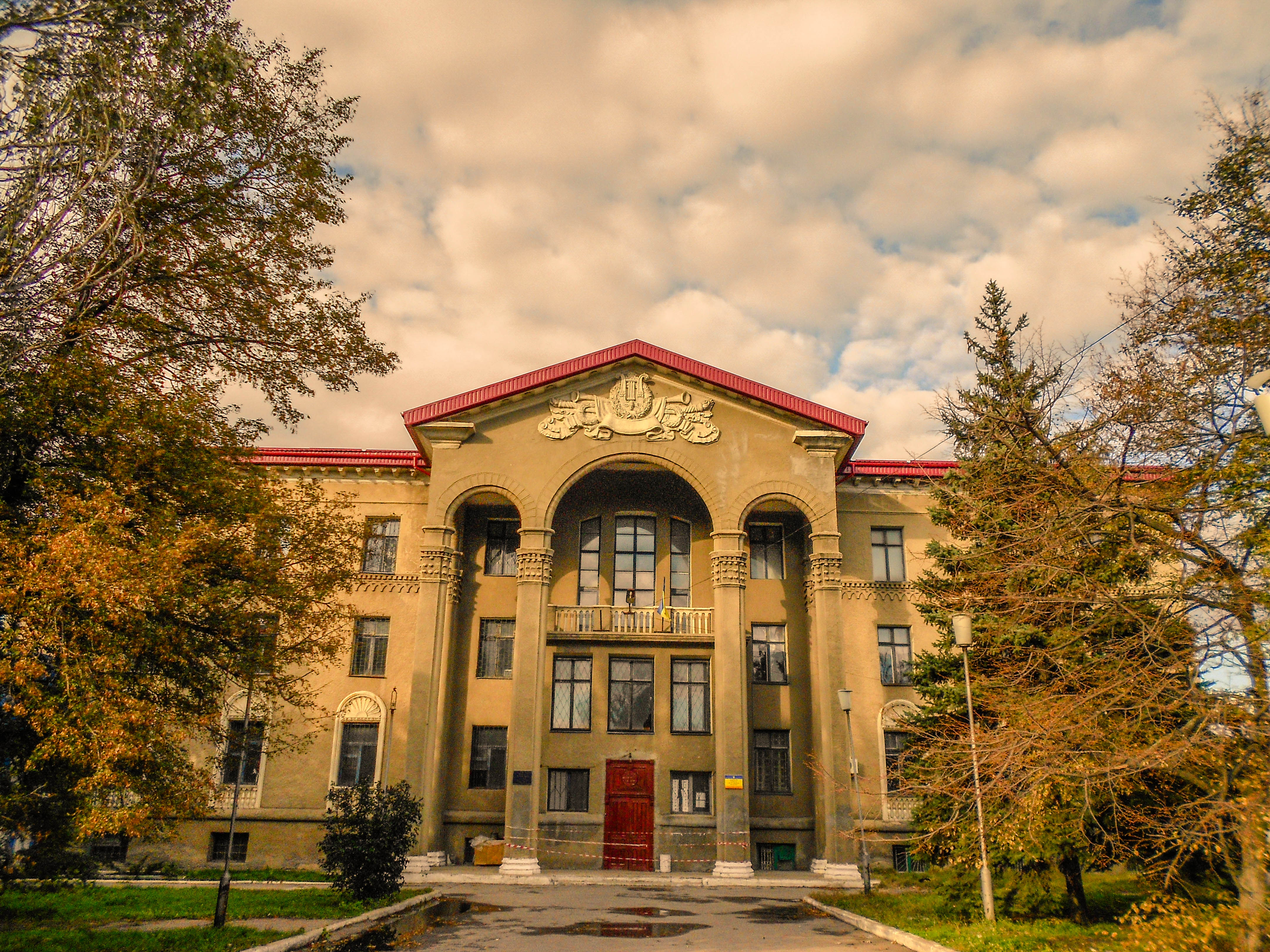 Палац культури, Горлівка, пр.Леніна,1